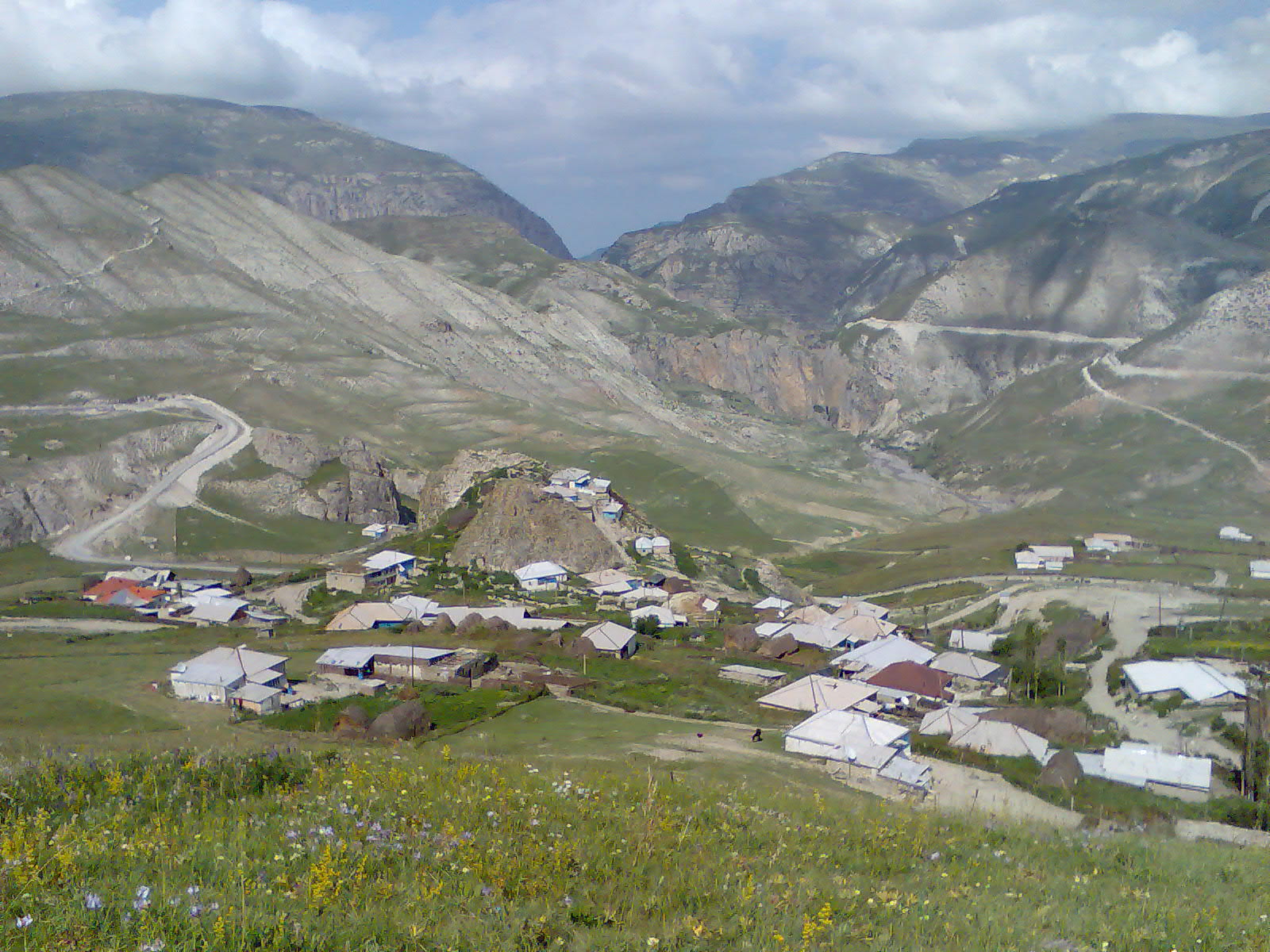 Cek kəndi XXI əsrin əvvəllərində